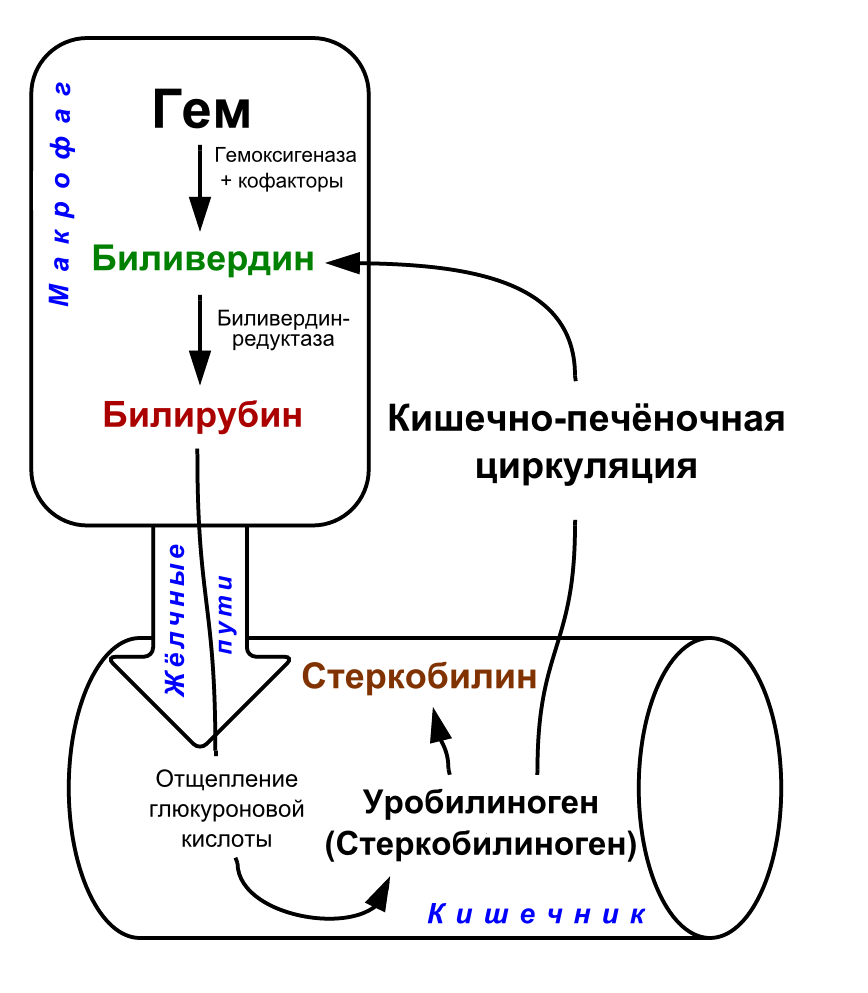 Метаболизм гема